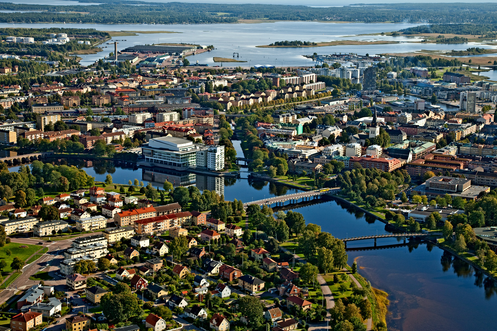 Flygfoto över Karlstad